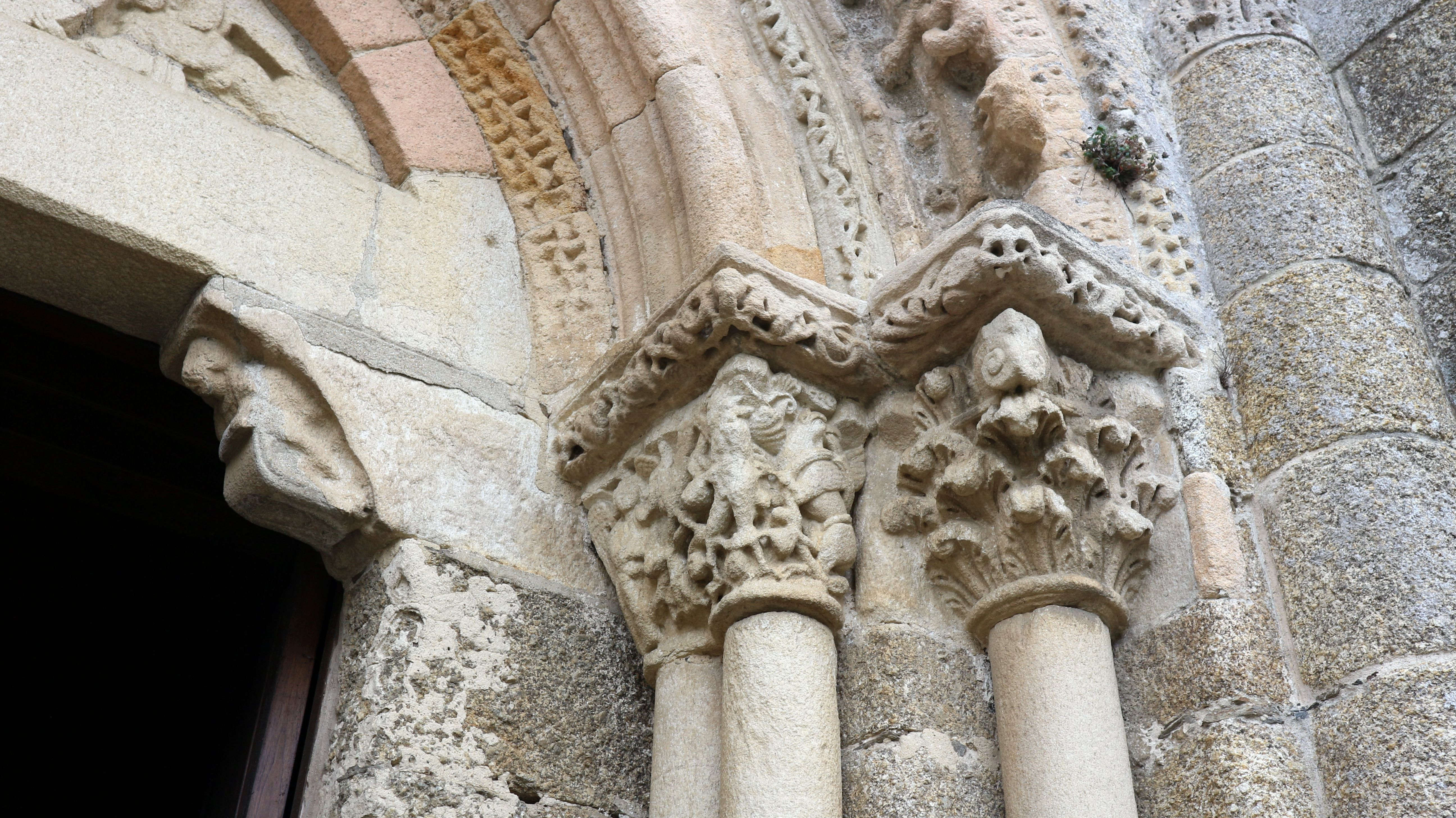 Igrexa de Santa María de Cambre, Cambre. Tímpano.